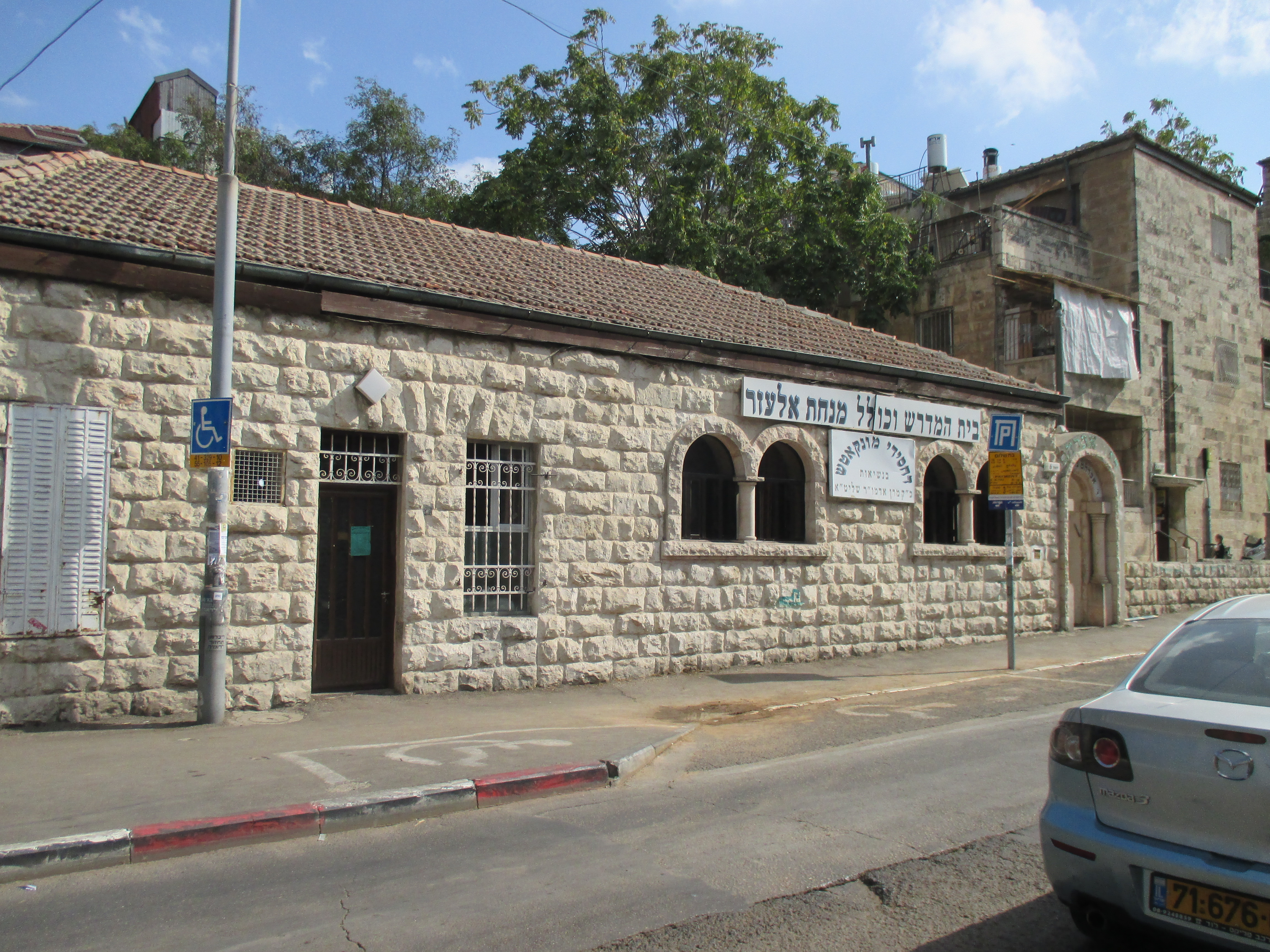 בית המדרש מנחת אלעזר בשכונת מאה שערים בירושלים